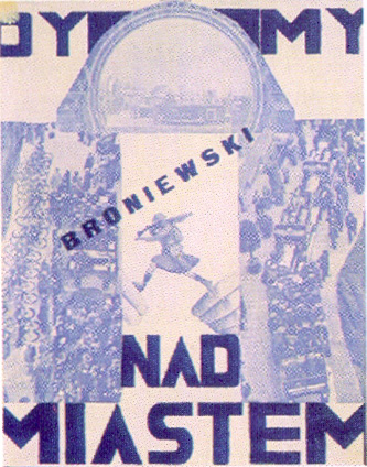 Tomik wierszy Władysława Broniewskiego, Dymy nad miastem. Okładkę projektował Mieczysław Szczuka (zm. 1927).